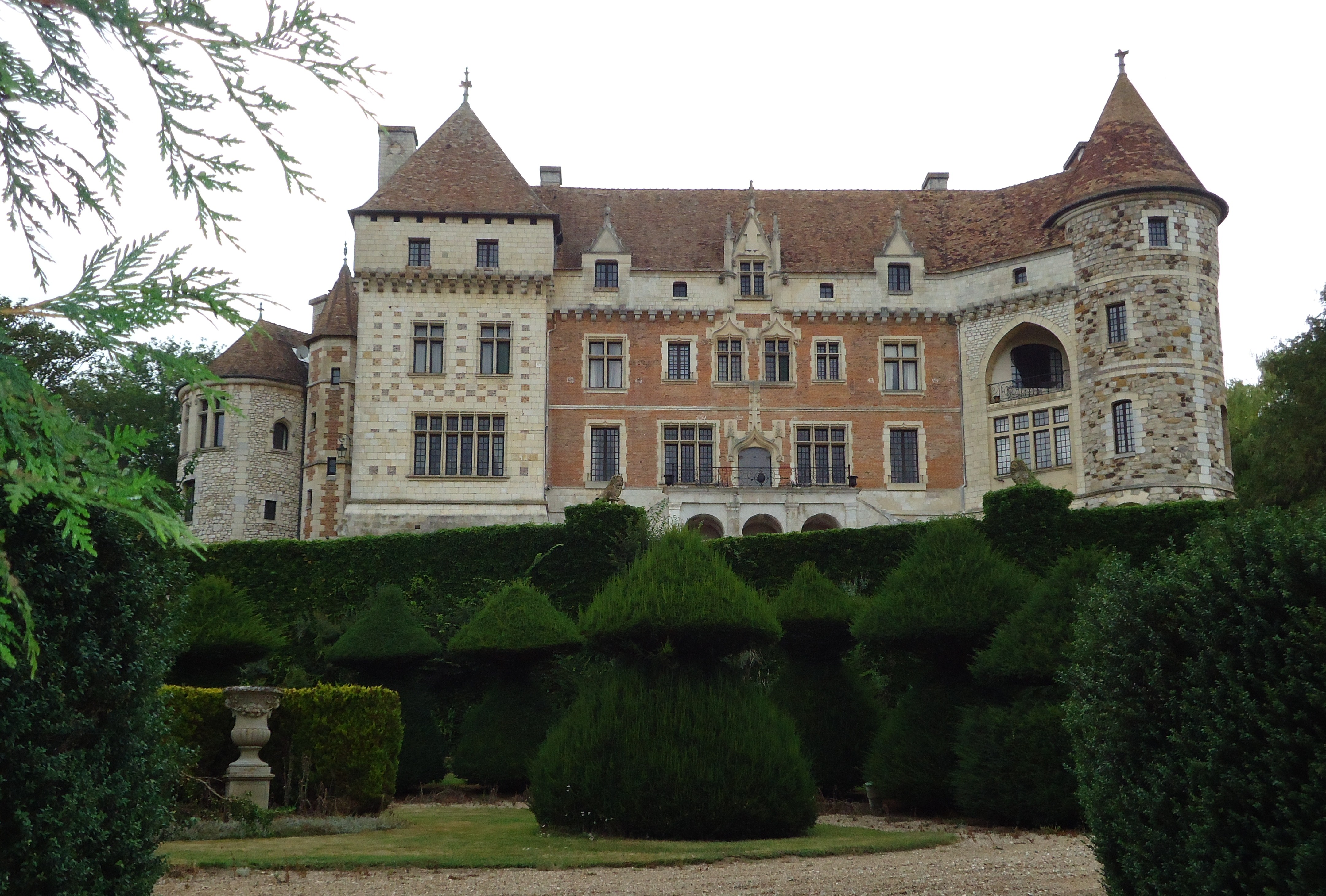 Château de Houetteville - Houetteville - Eure (27)